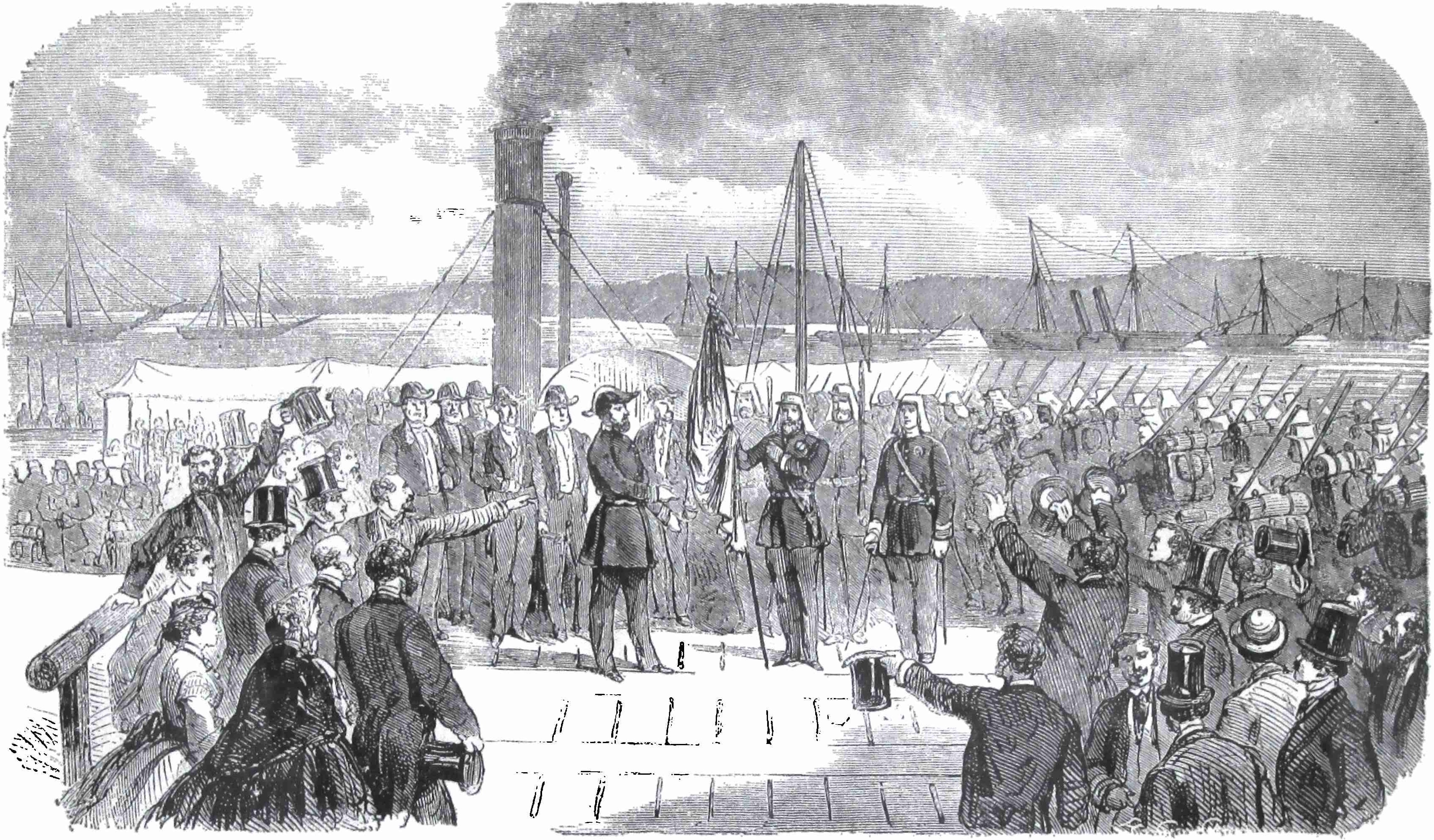 El emperador del Brasil entregando la bandera á la Guardia Nacional, en el momento de su salida para el Paraguay (1865). (Tomada de la obra en prensa «Album de la Guerra del Paraguay» por José Arturo Scotto).